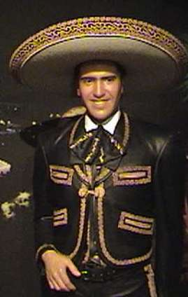 Figura de Alejandro Fernandez en el Museo de Cera Veracruz